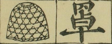 粵語: 罩。取自對大明時相四言雜字。出版洪武辛亥孟秋吉日。金陵王氏勤有書堂。